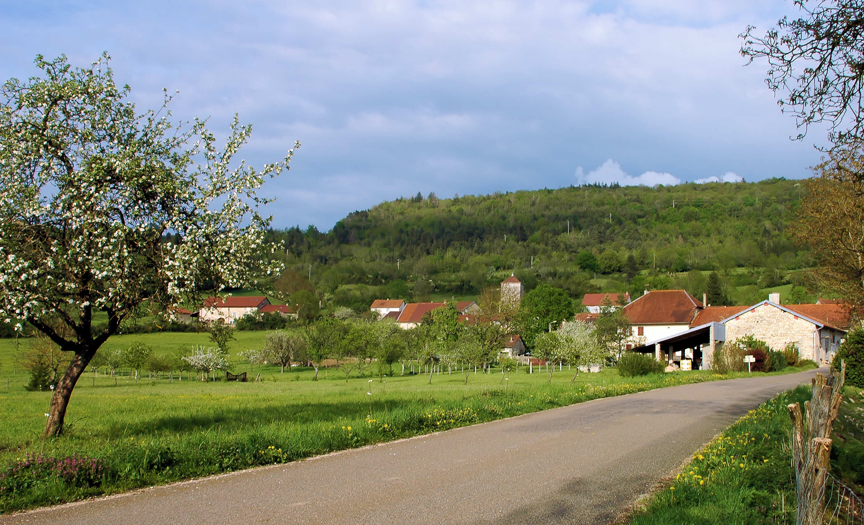 Legna